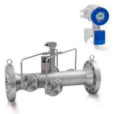 Ультразвуковой расходомер